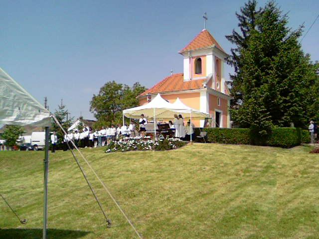 Pécsbagota, kápolna szentelő, 2006